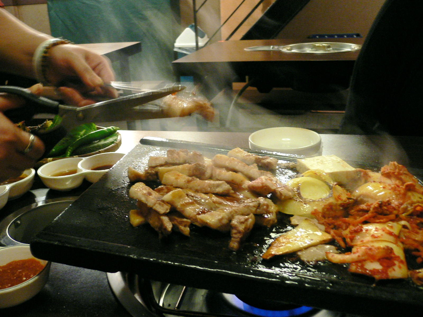 Samgyeopsal, Korean pork barbeque